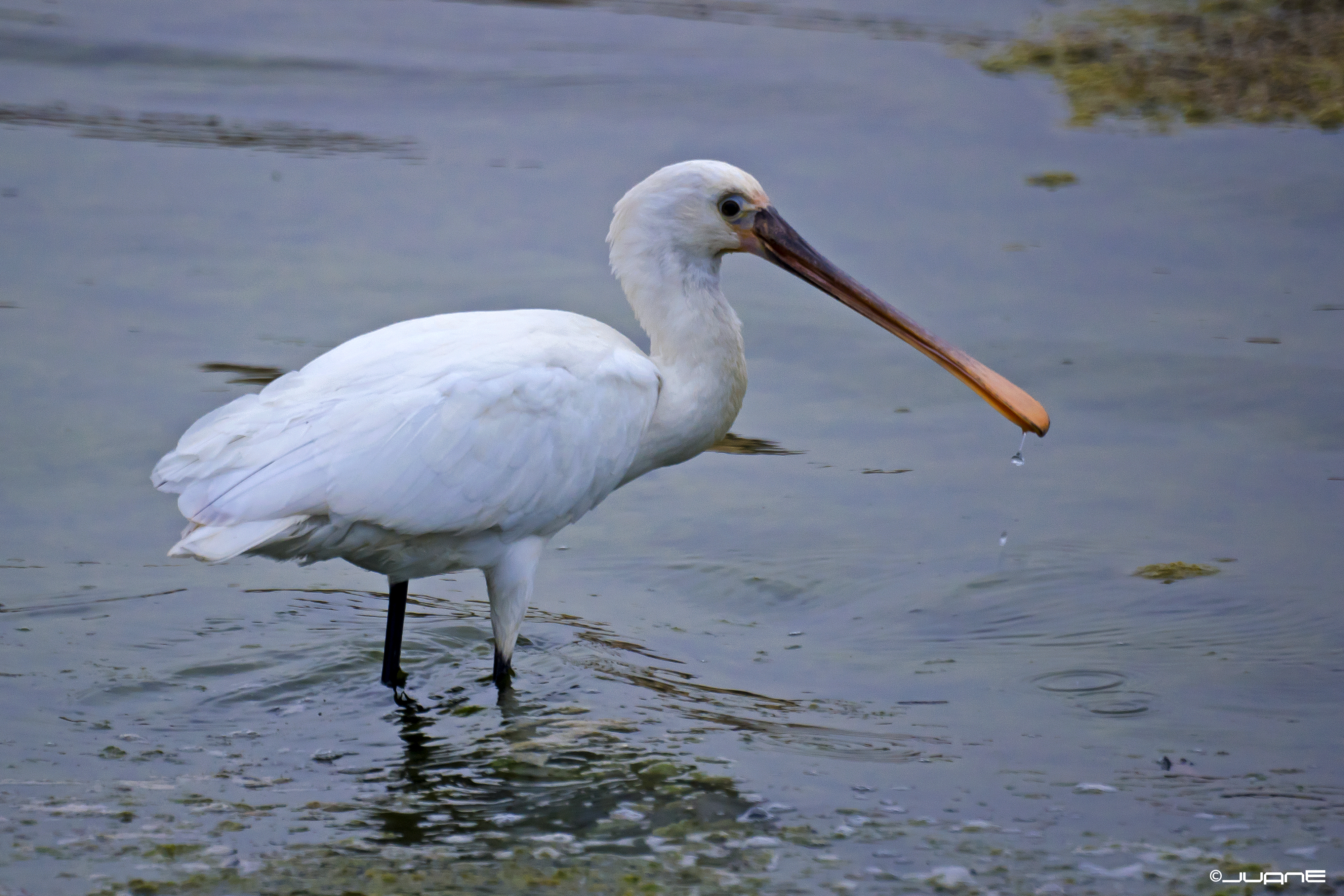 Espátula - Platalea leucorodia (Threskiornithidae)